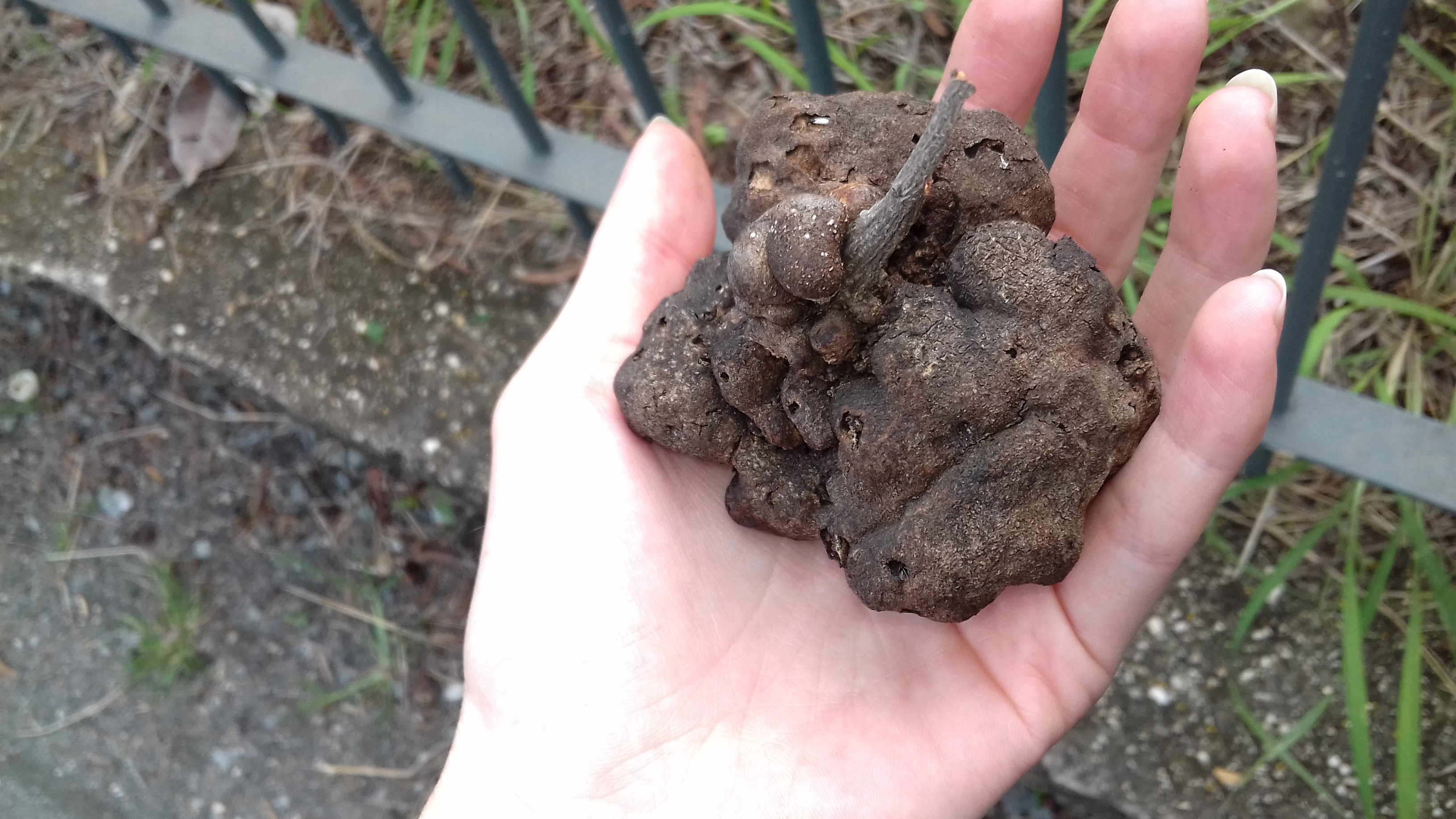 Galle détachée d'une branche d'Acacia spirorbis, Nouméa, Nouvelle-Calédonie